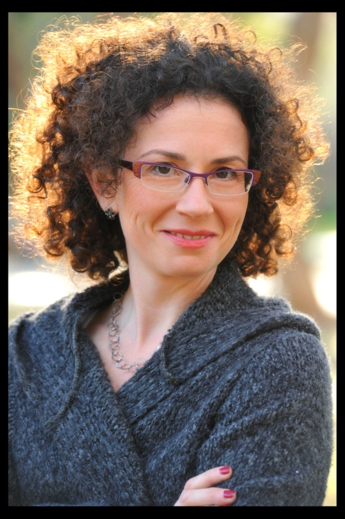 יוליה פבזנר